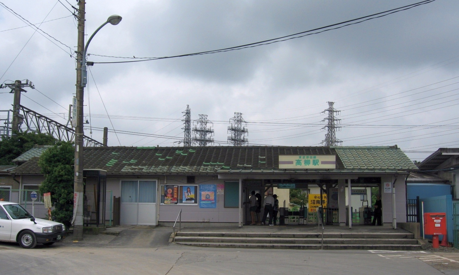 Takayanagi Station, Tobu Railway Noda Line. 1489 Takayanagi, Kashiwa, Chiba.